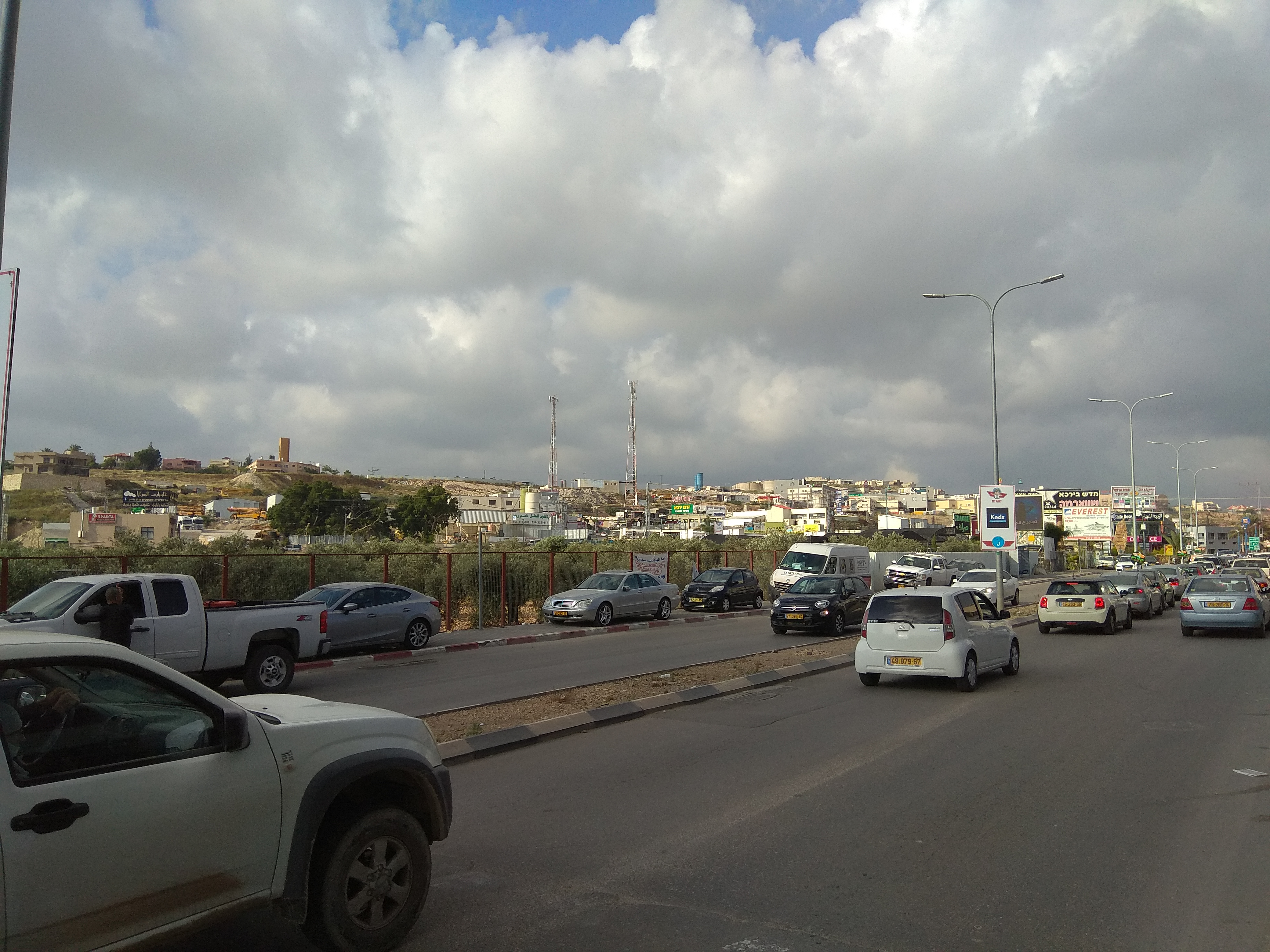 כביש הכניסה לירכא, 2018